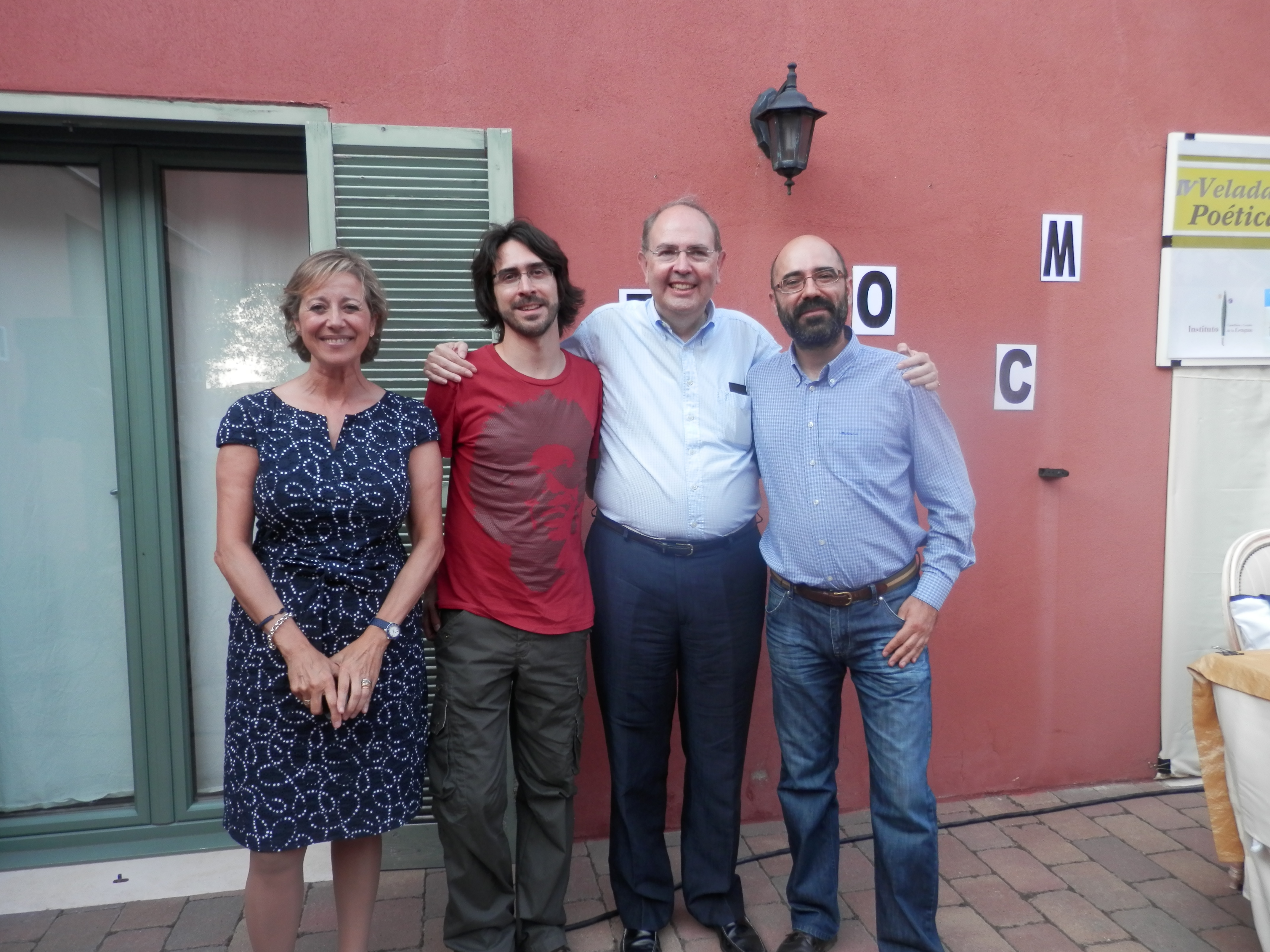 IV Velada Poética de Olmillos de Sasamón, 9 de agosto de 2014. De izquierda a derecha: Mariajesús Jabato, José Gutiérrez Román, José Manuel López Gómez (director de la Institución Fernán González) y Óscar Esquivias.